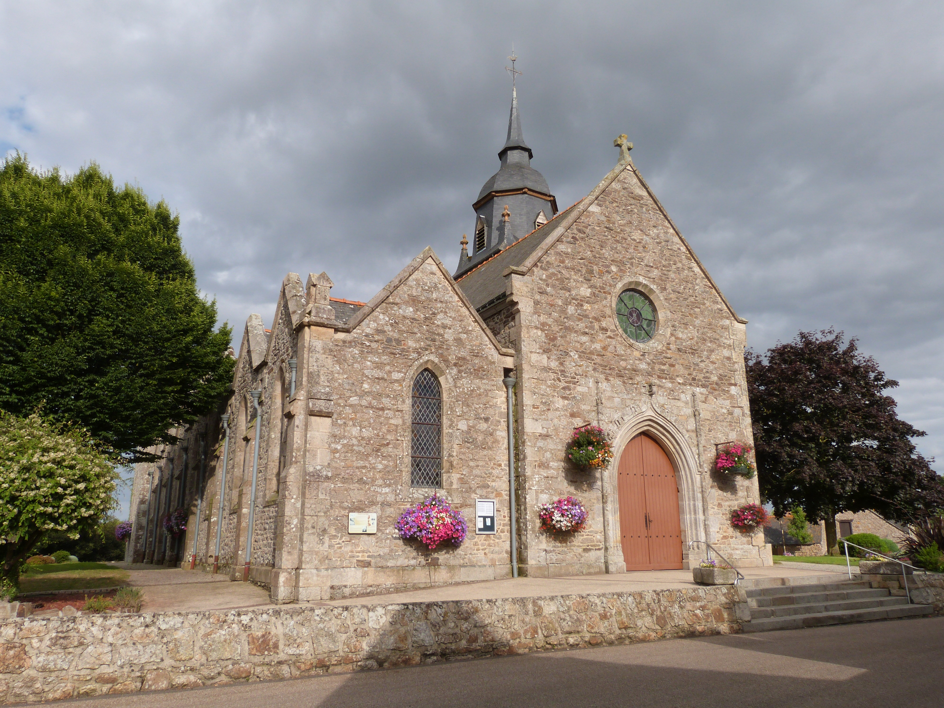 Eglise Saint-Pierre de Plestan